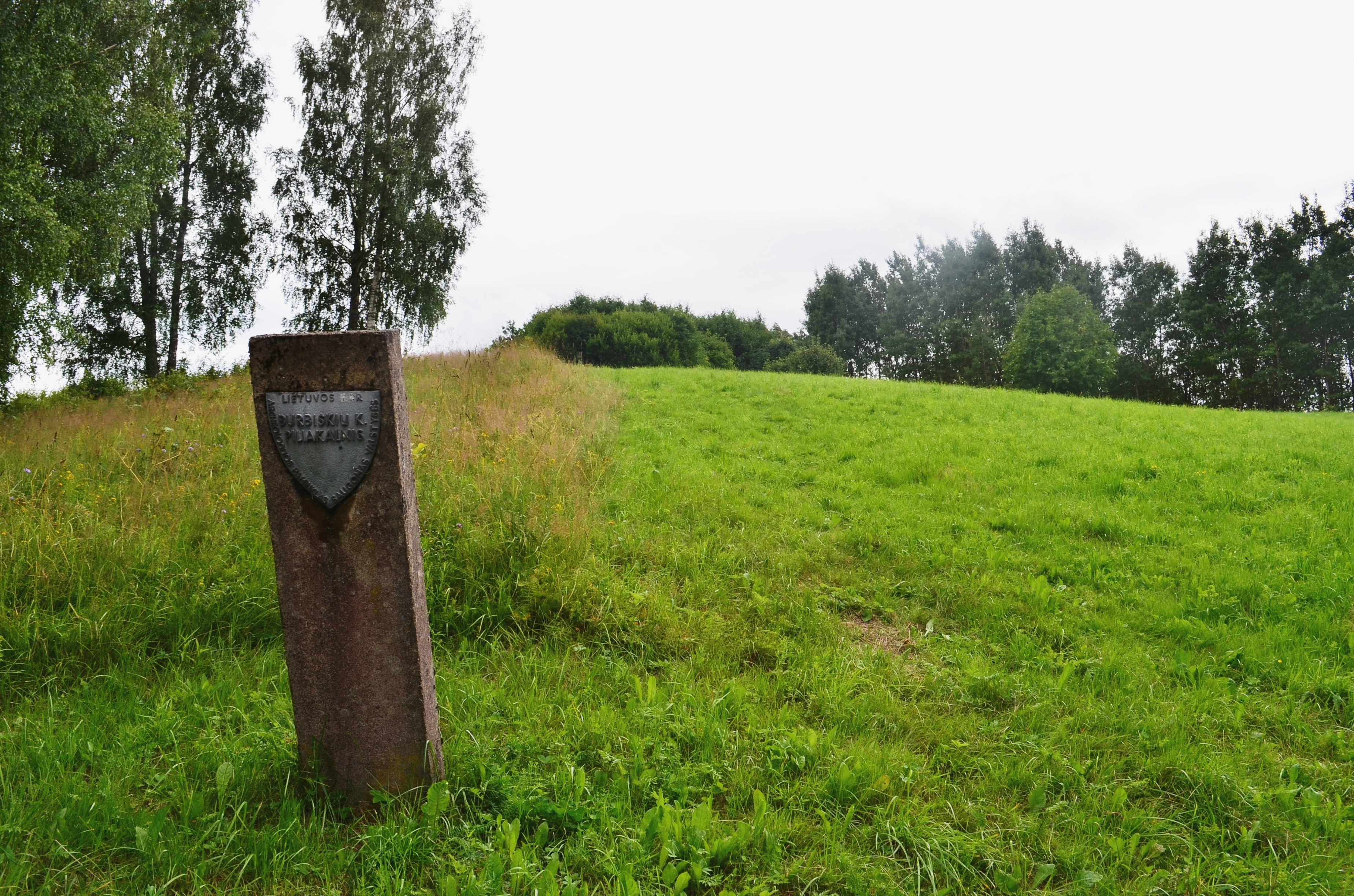 Burbiškių piliakalnis (Paršpilis), Šilalės raj. Žemaitėška: Borbėškiu pėliekalnis (Paršpėlis), Šėlalės raj.